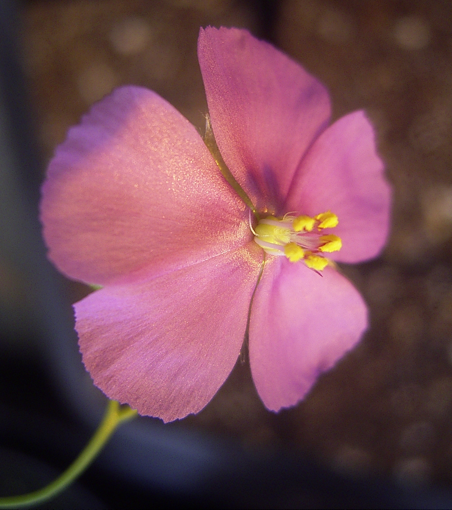 Flora Drosera menziesii